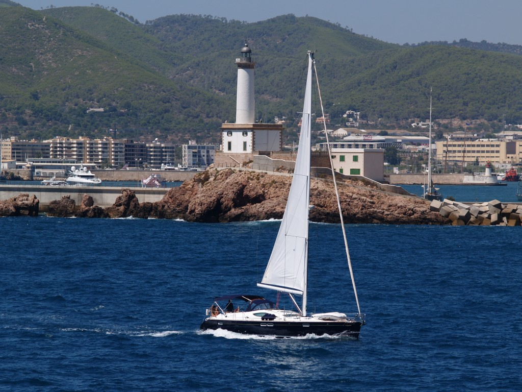 Eivissa harbour